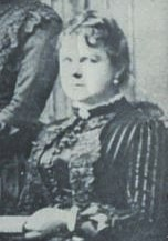 Hija de Juan Mackenna Vicuña y de Dominga Serrano Castro. Nieta del general del ejército libertador Chileno Juan Mackenna Madre del doctor Luis Calvo Mackenna